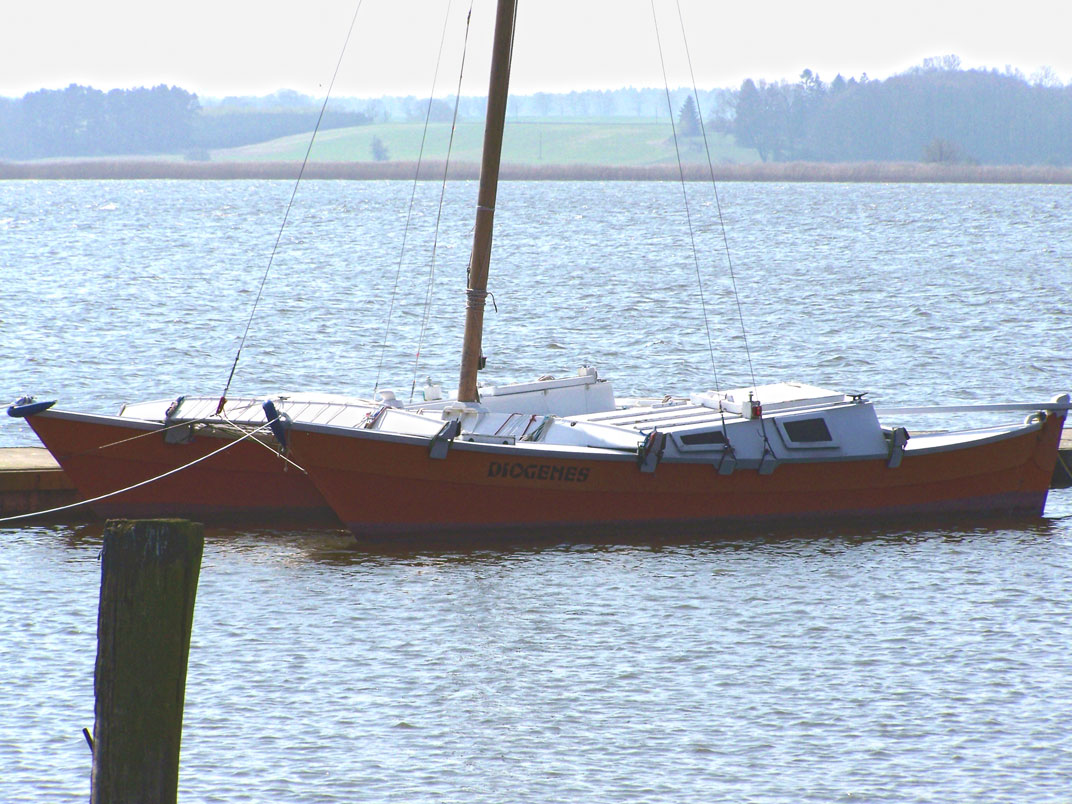 Tiki 26, Eigenbau-Katamaran, Liegeplatz Ostsee